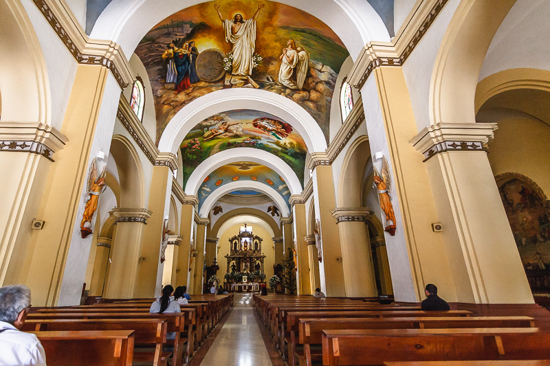 Trujillo, La Libertad, Perú